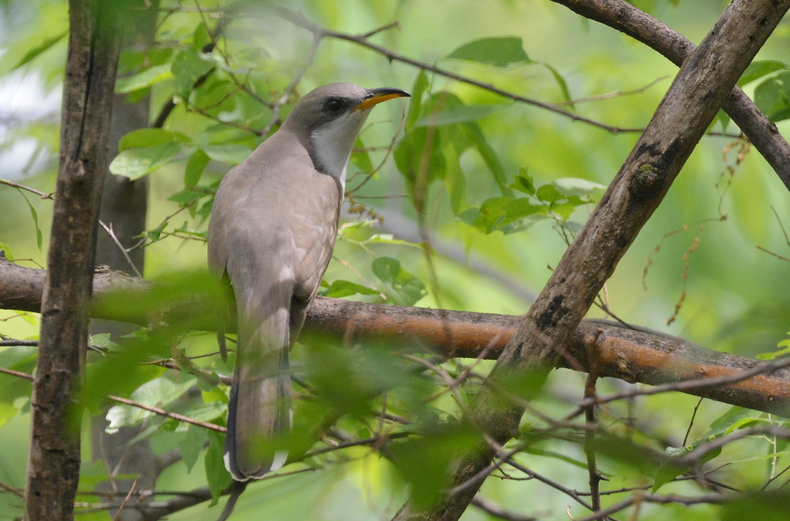 Carondelet Park 5/4/15